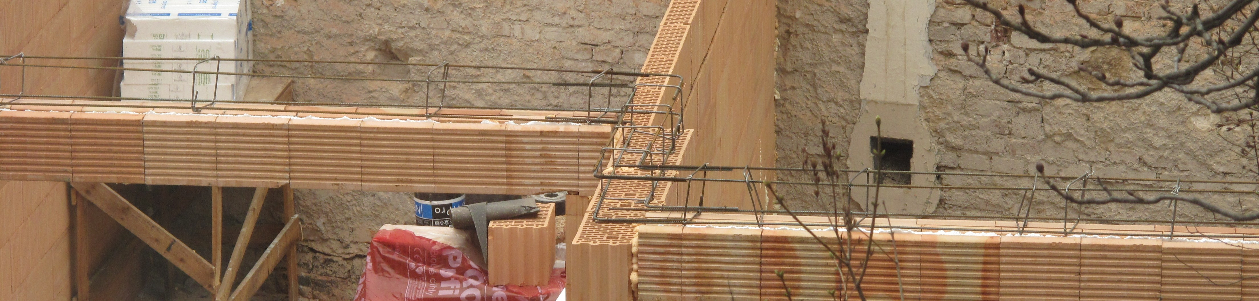 Drátěná složka věnce.